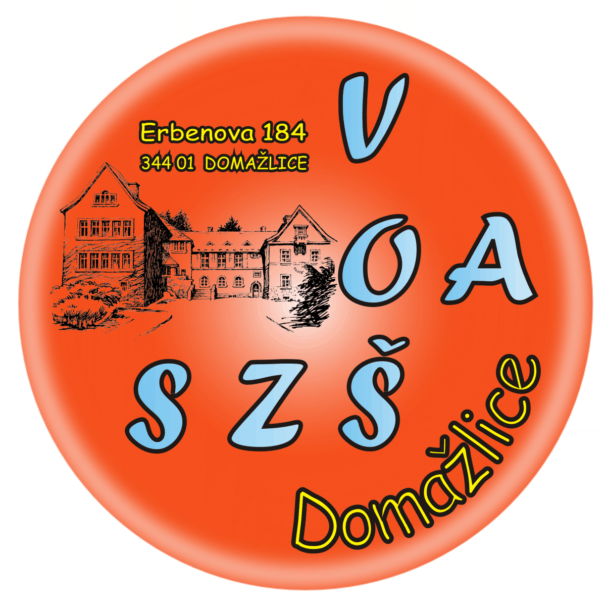 OA Domažlice - logo